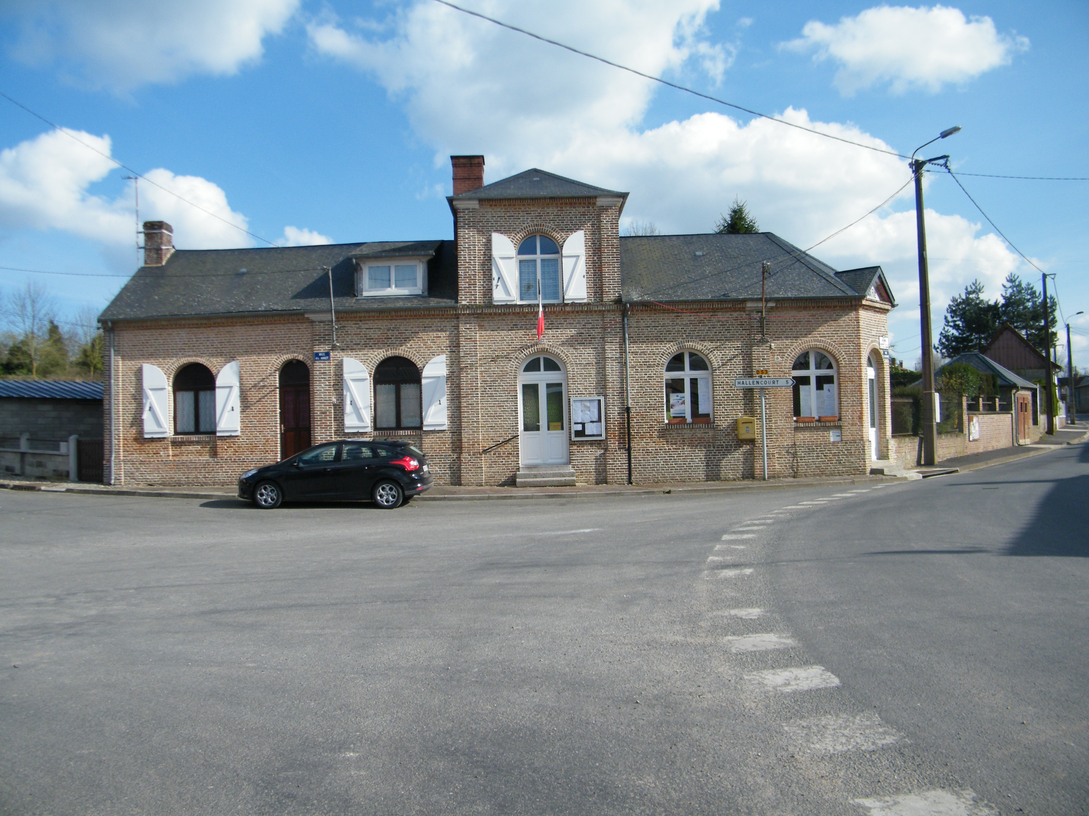 Bâtiments communaux.